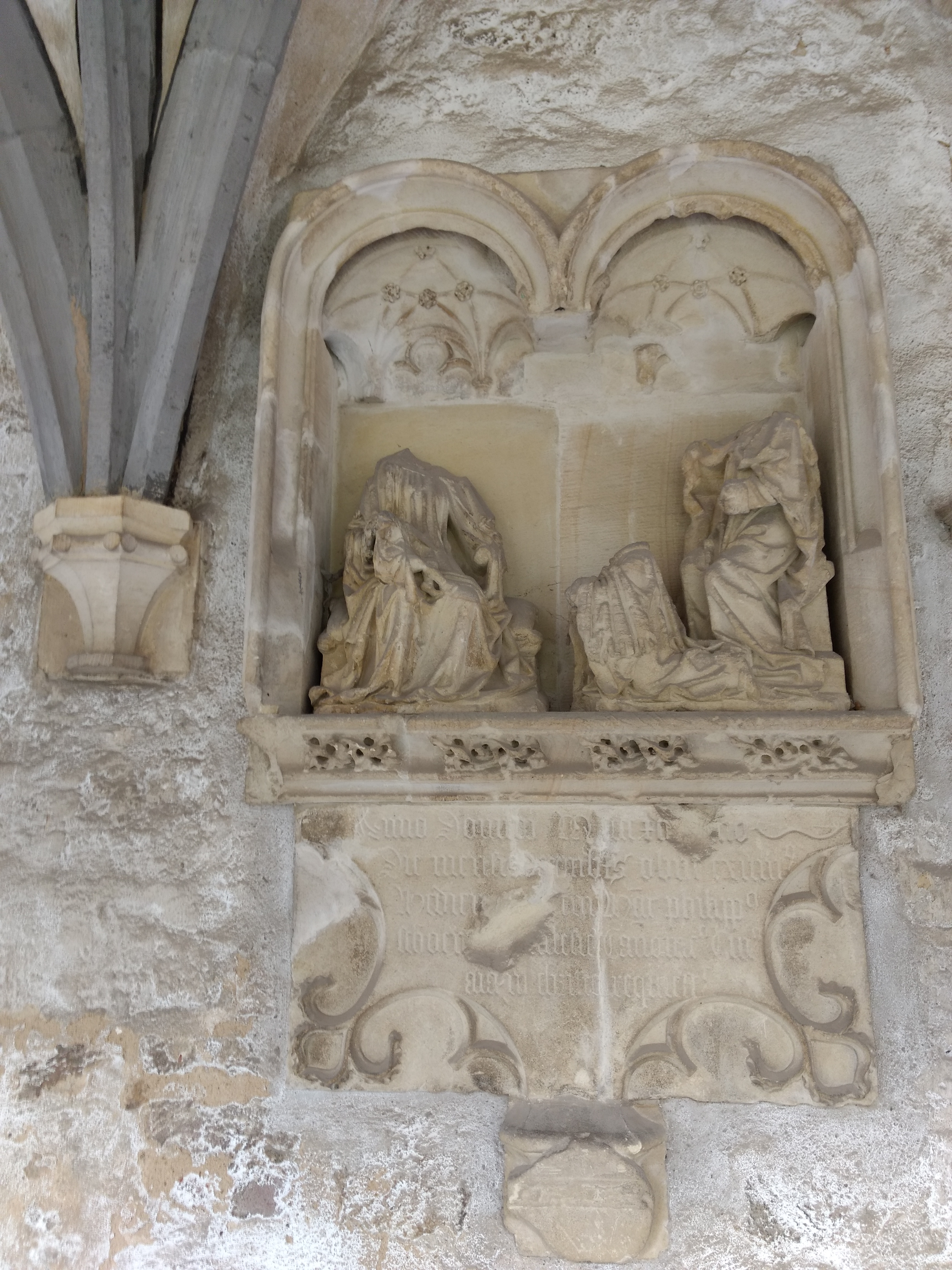 Xanten, Domkreuzgang: Epitaph des Xantener Kanonikers Dr. med. Philipp Schoen (gest. 1492), zugeschrieben an Dries Holthuys